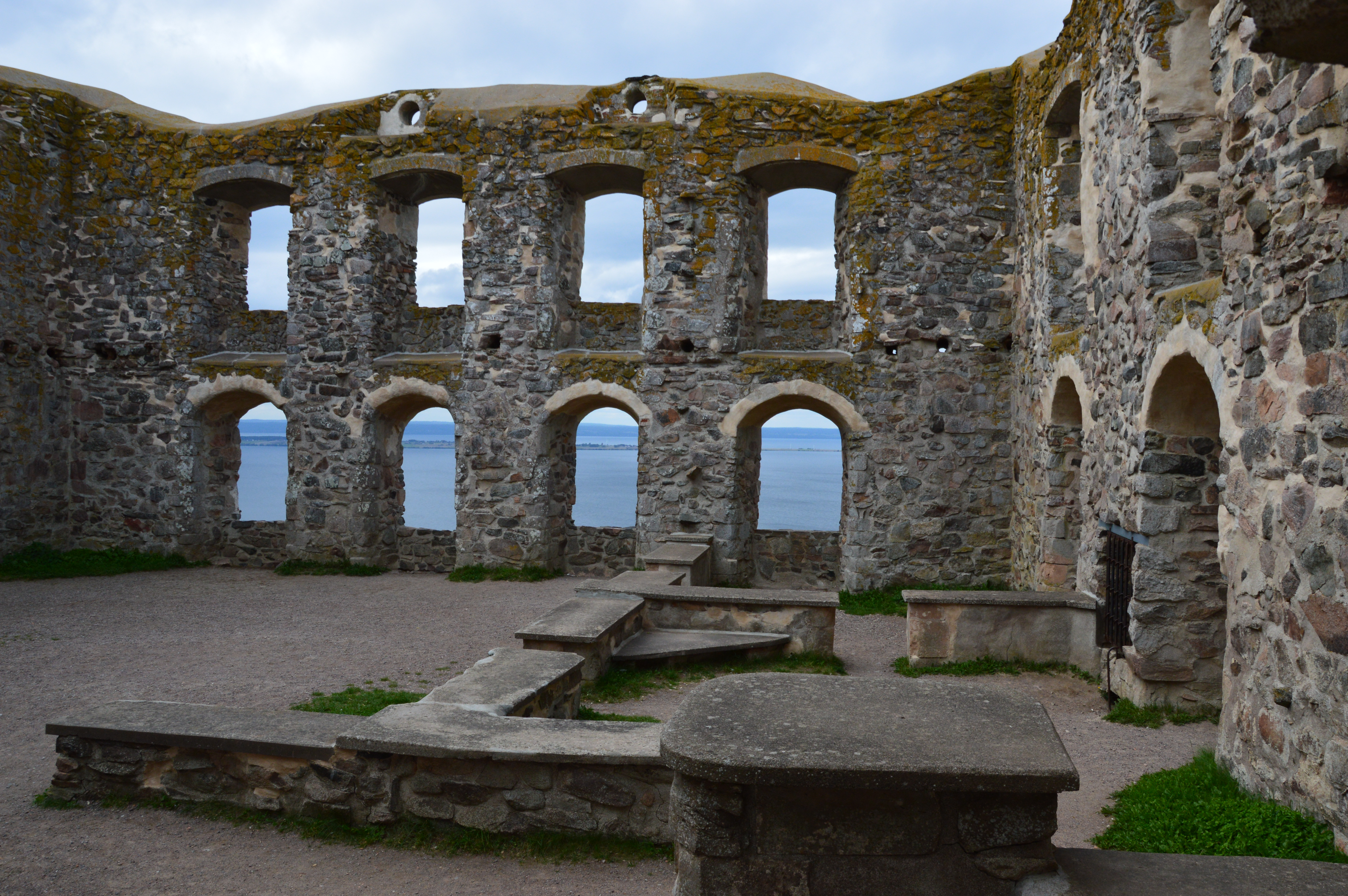 Brahehus, Rootsi.